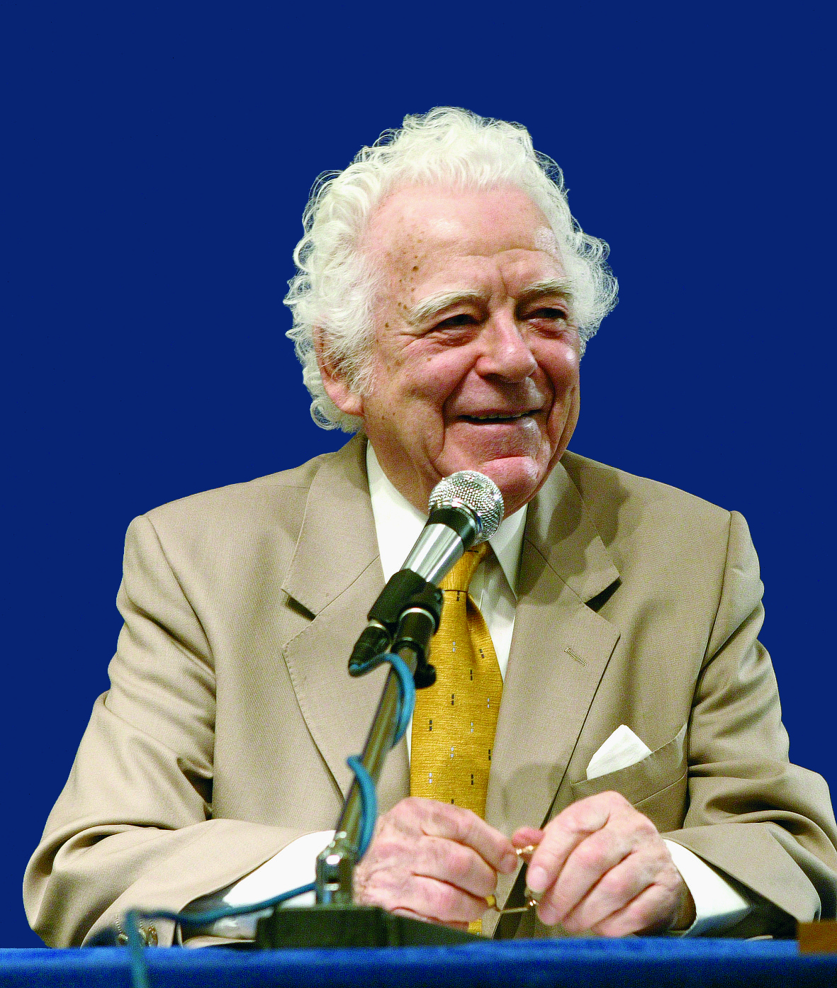 Benjamin Creme en conférence à Paris le 17 mars 2006